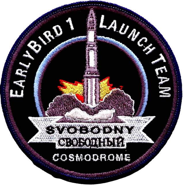 Нашивка, посвященная запуску КА Early Bird 1 с космодрома Свободный в 1997 году.